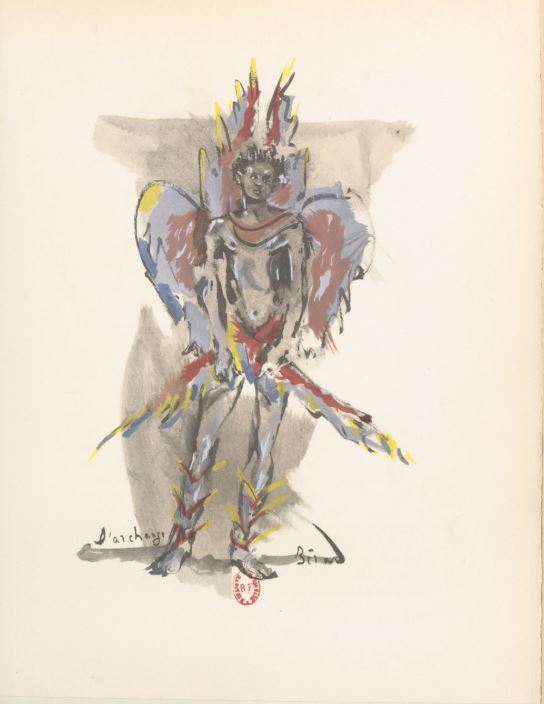 Illustration par Christian Bérard de Sodome et Gomorrhe de Jean Giraudoux, publié en 1943 par Grasset.